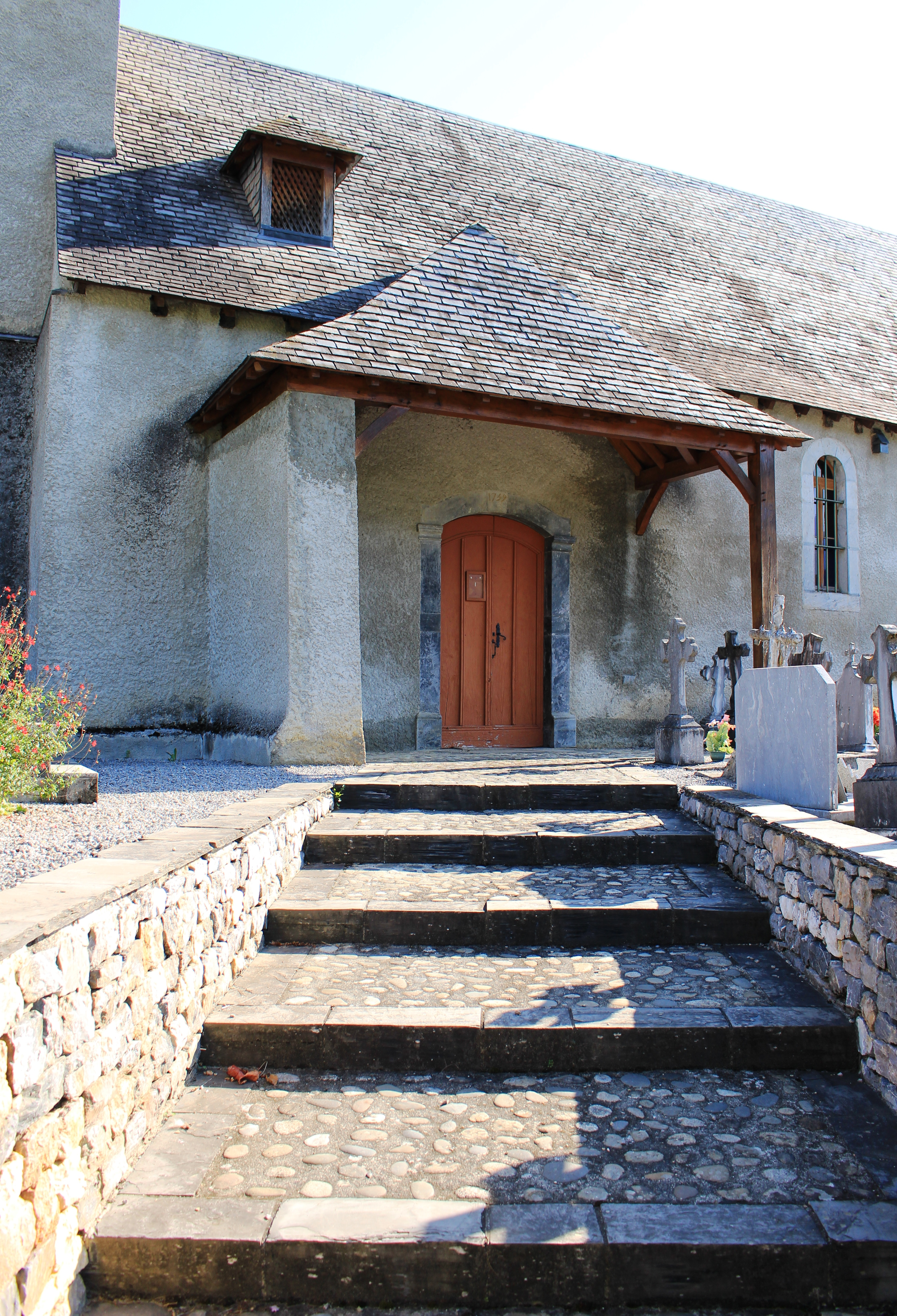 Église de l’Assomption de Marsas (Hautes-Pyrénées)